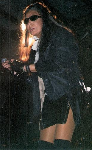 Emiliàn e rumagnòl: Loredana Bertè dal viṿ a 'l Estragon ad Bulógna al 7 ad Dicémbar dal 2006